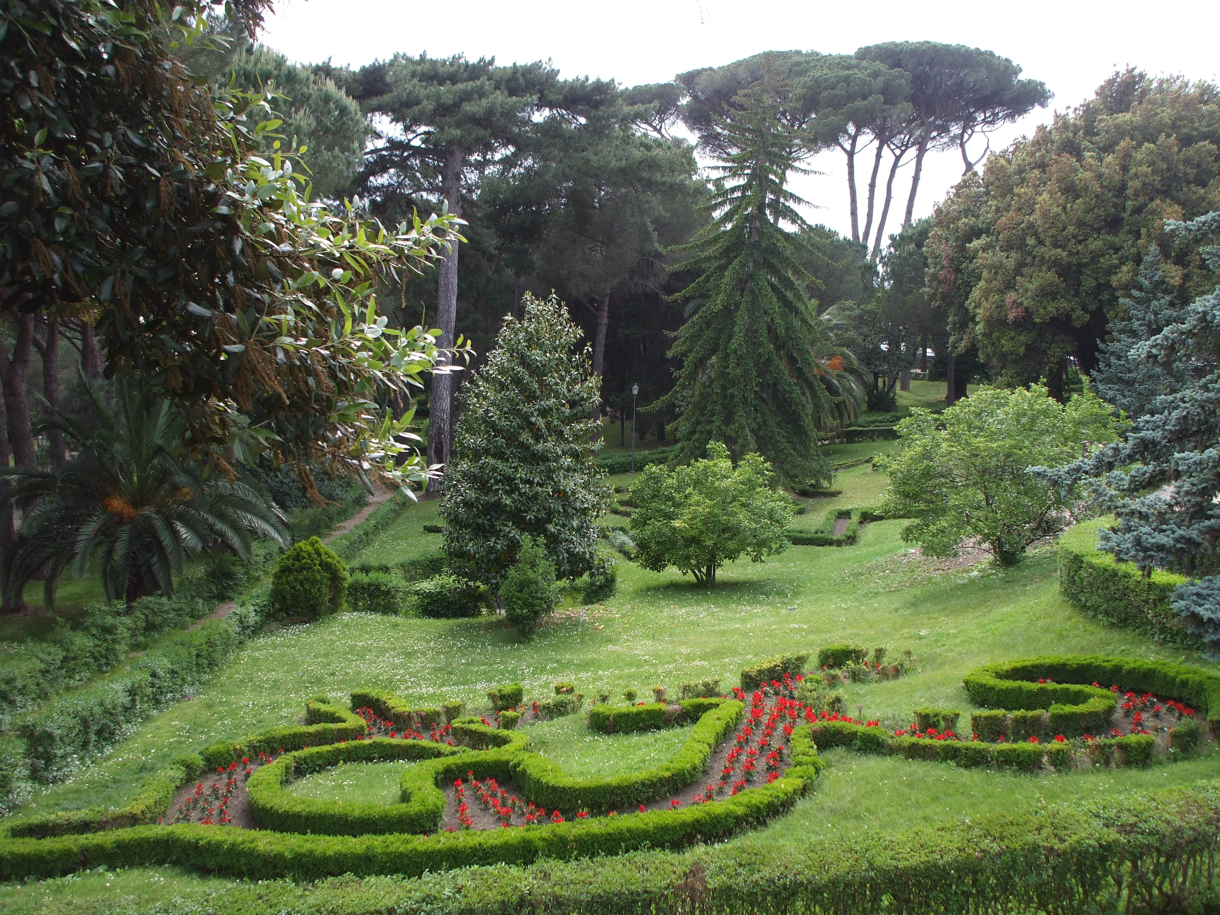 La Villa Doria di Albano Laziale